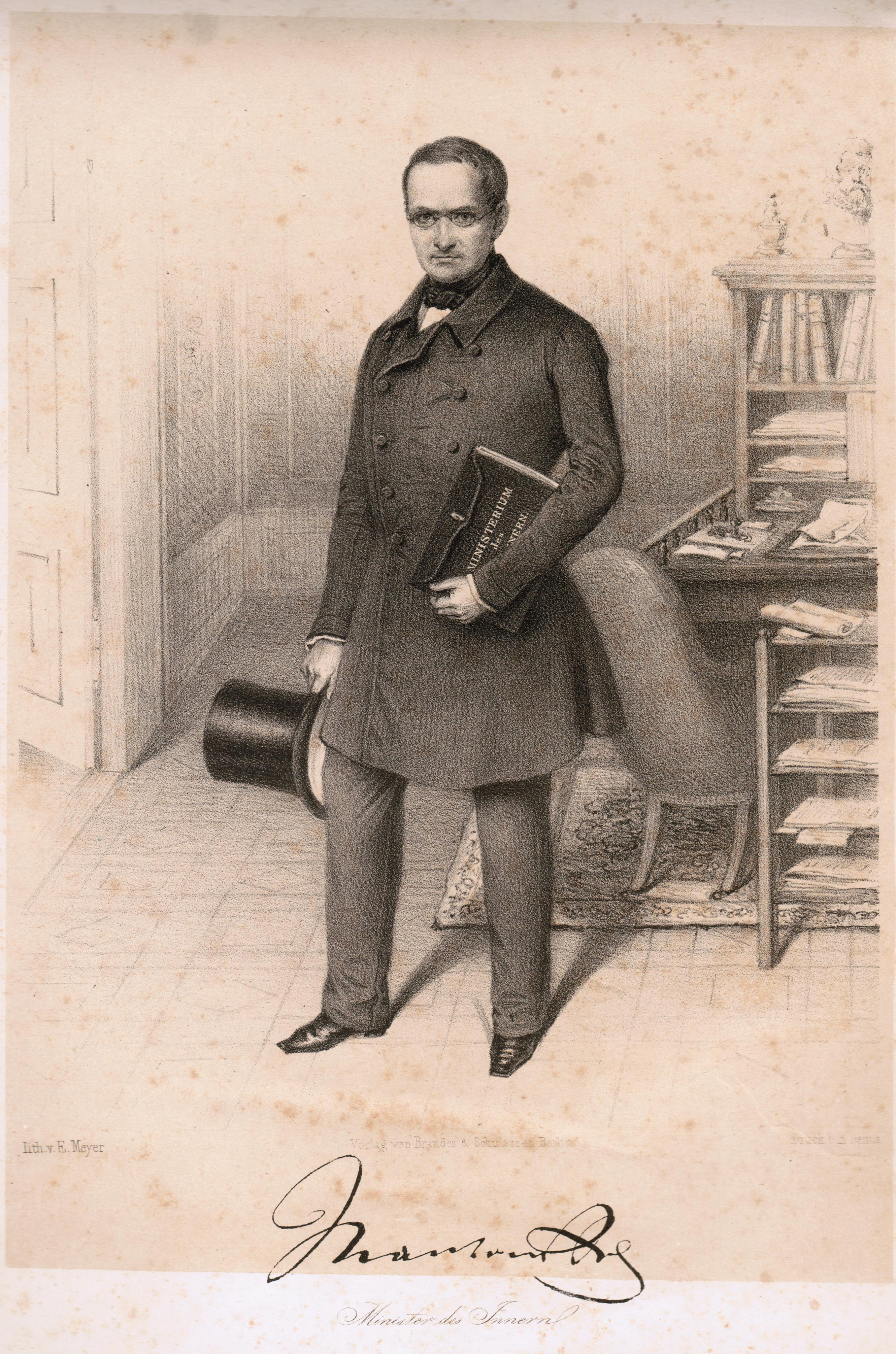 Manteuffel, Minister des Inneren Lith. v. E. Meyer Druck bei ..... Verlag von Brandes und Schultze in Berlin Lithographie, vor 1851. Blattgröße 31,5 x 45 cm, Tonplatte 15 x 24 cm